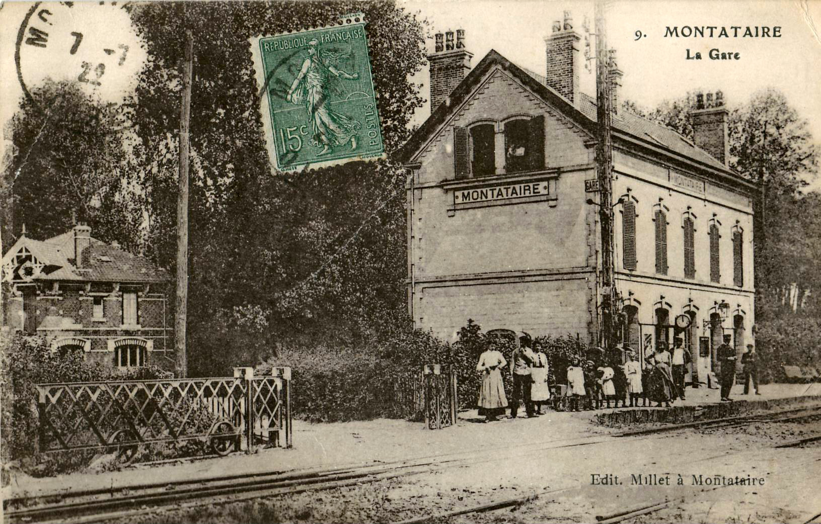 Carte postale ancienne éditée par Millet à Montataire, n°9 : MONTATAIRE - La Gare